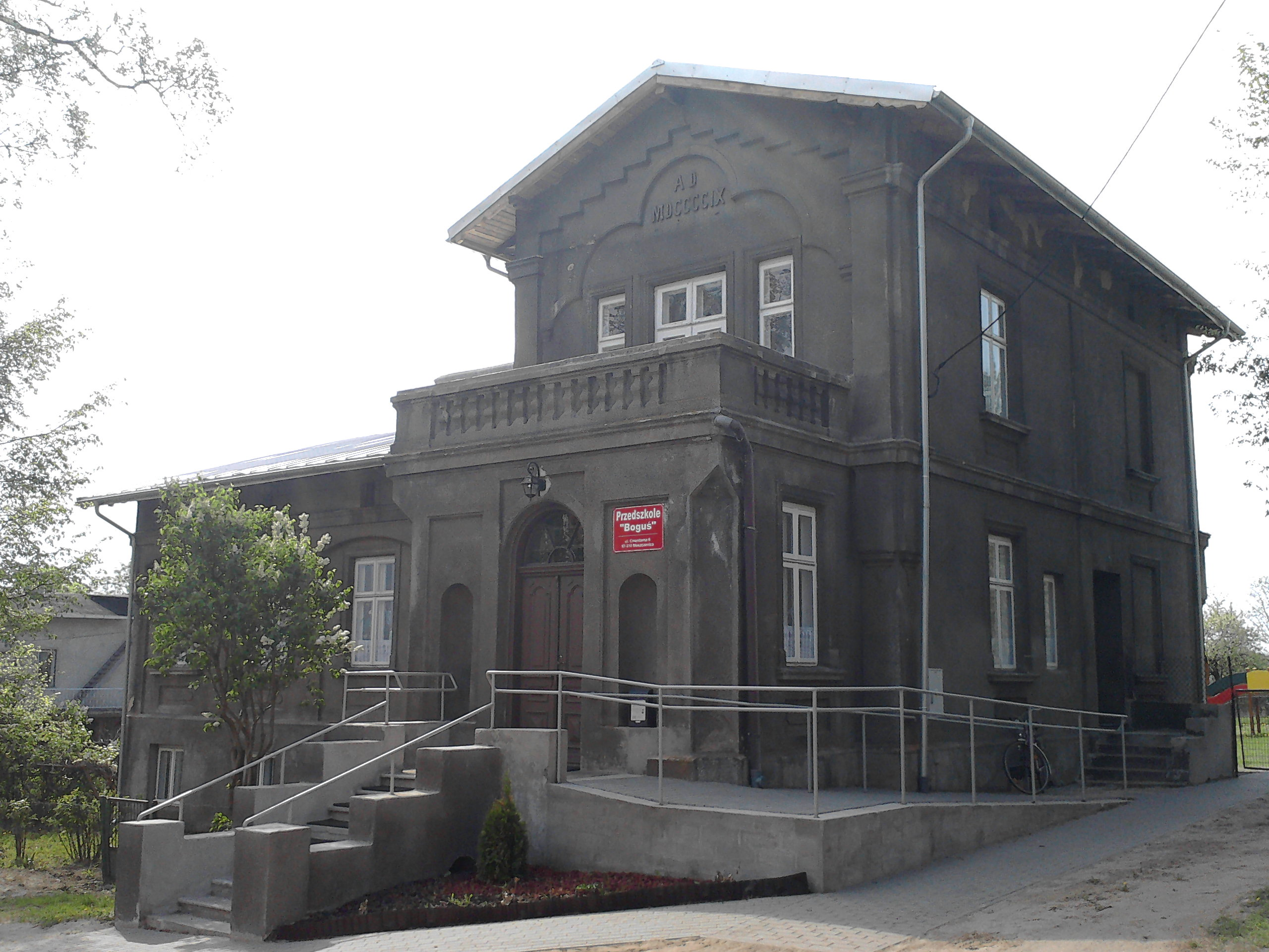 Stara plebania w Moszczenicy, wybudowana w 1909 roku; od 2011 r. przedszkole